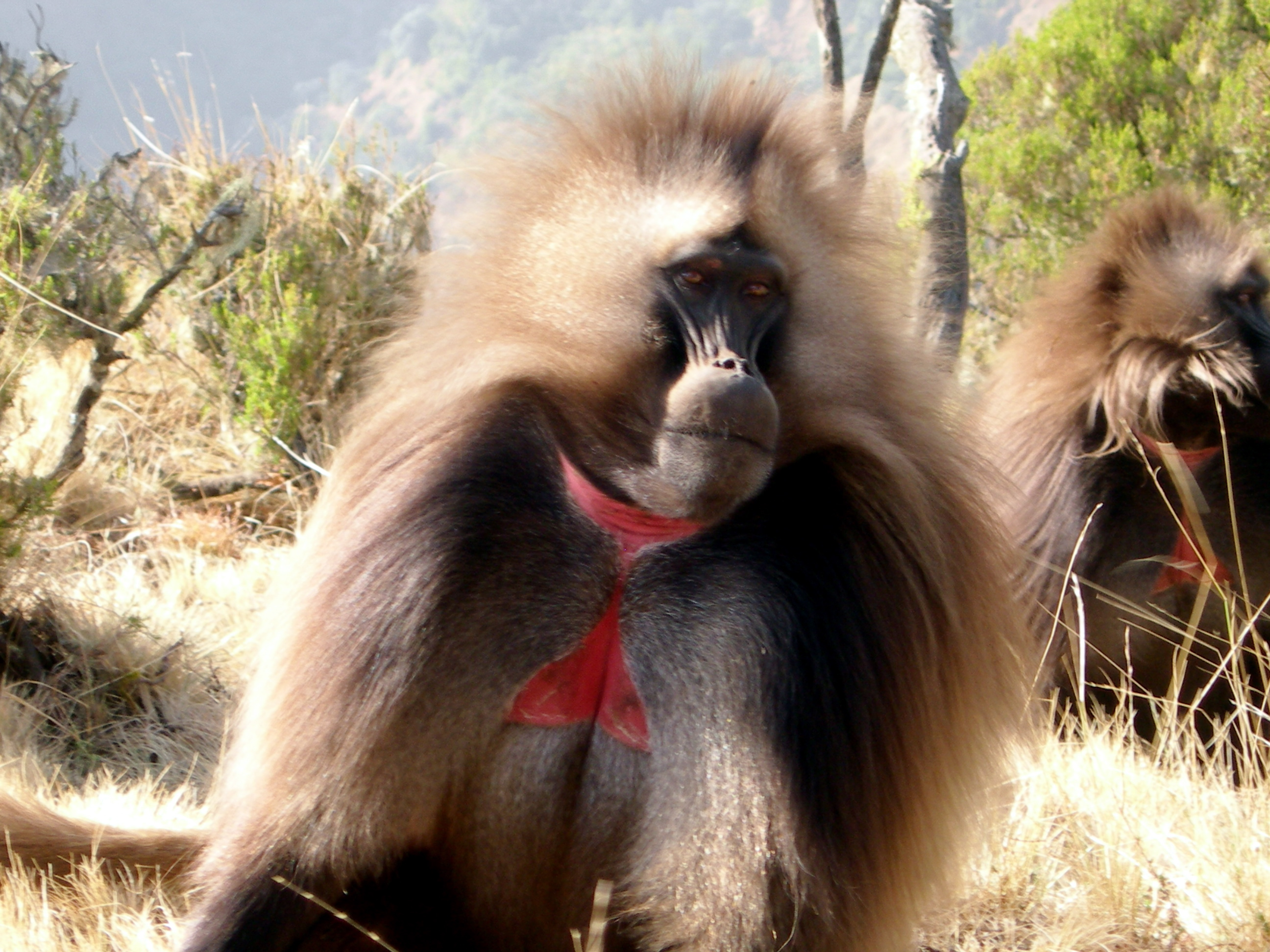 Gelada-Pavian im äthiopischen Hochland (Semiengebirge)